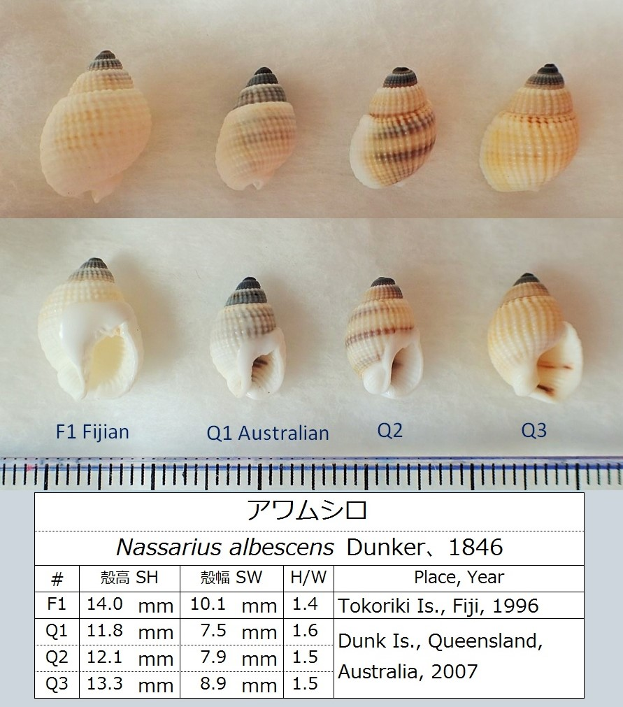 フィジーはトコリキ島の老成貝。オーストラリアはダンク島産で殻口に滑層があるものと無いもの。